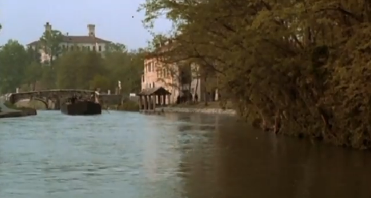 Screenshot del film L'Albero degli Zoccoli di Ermanno Olmi, 1978